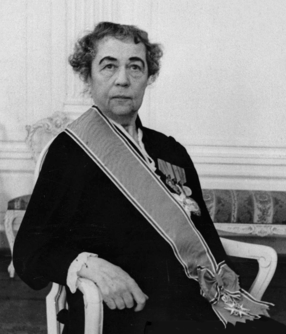 The first soviet ambassador to Norway, Alexandra Kollontai, at the Norwegian embassy after being awarded the order of Saint Olaf.